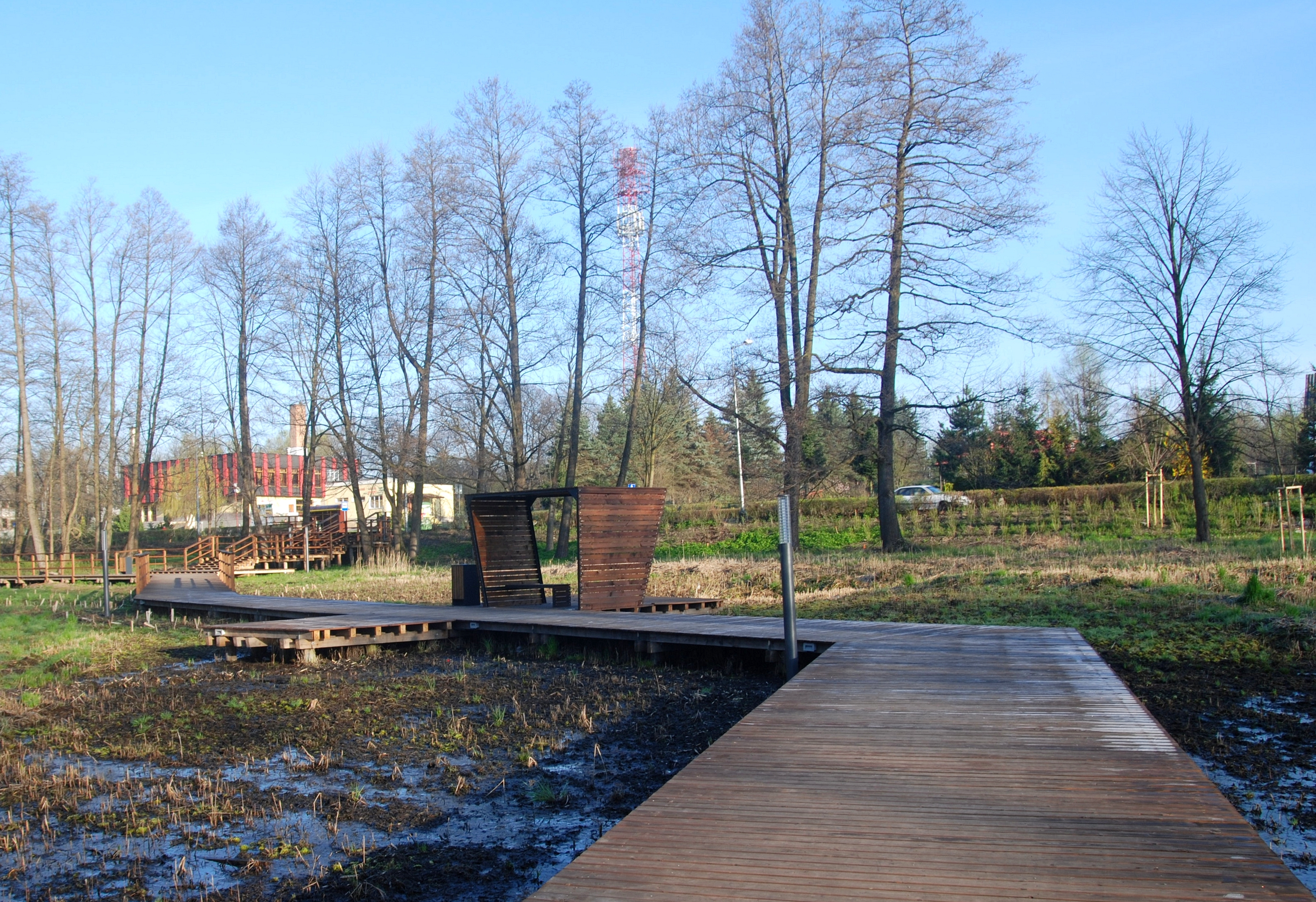 wieś Horyniec-Zdrój